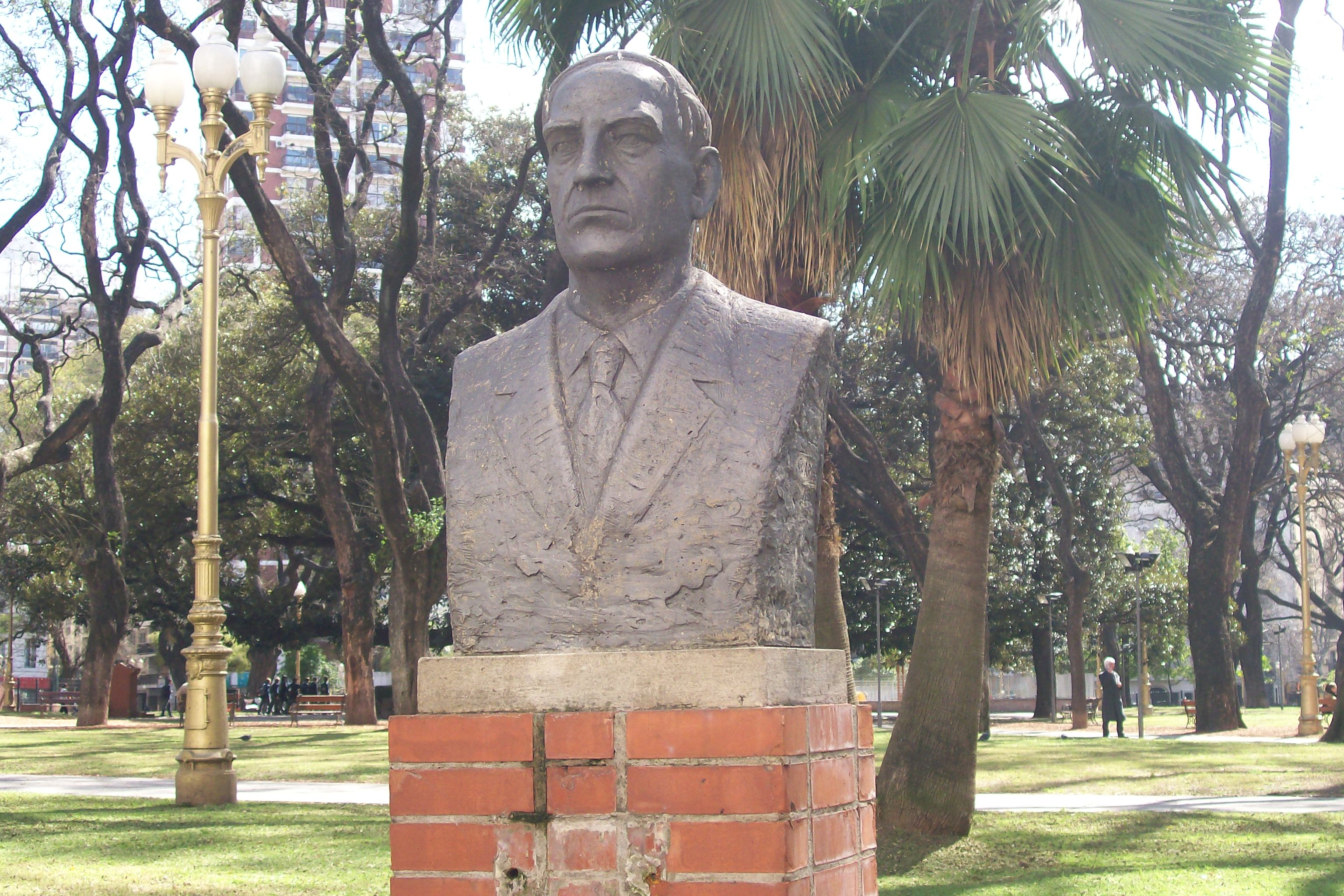 busto de Manuel Galvez, en la plaza Vicente Lopez, Bs.AS